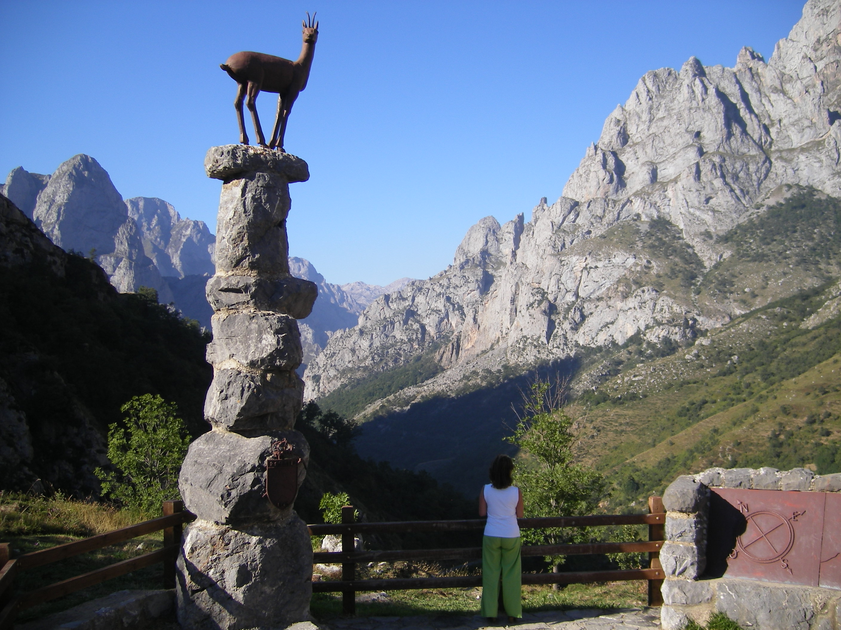 Picos de Europa This is a photography of a Special Area of Conservation in Spain with the ID: ES0000003. Natura2000 entry, EEA entry